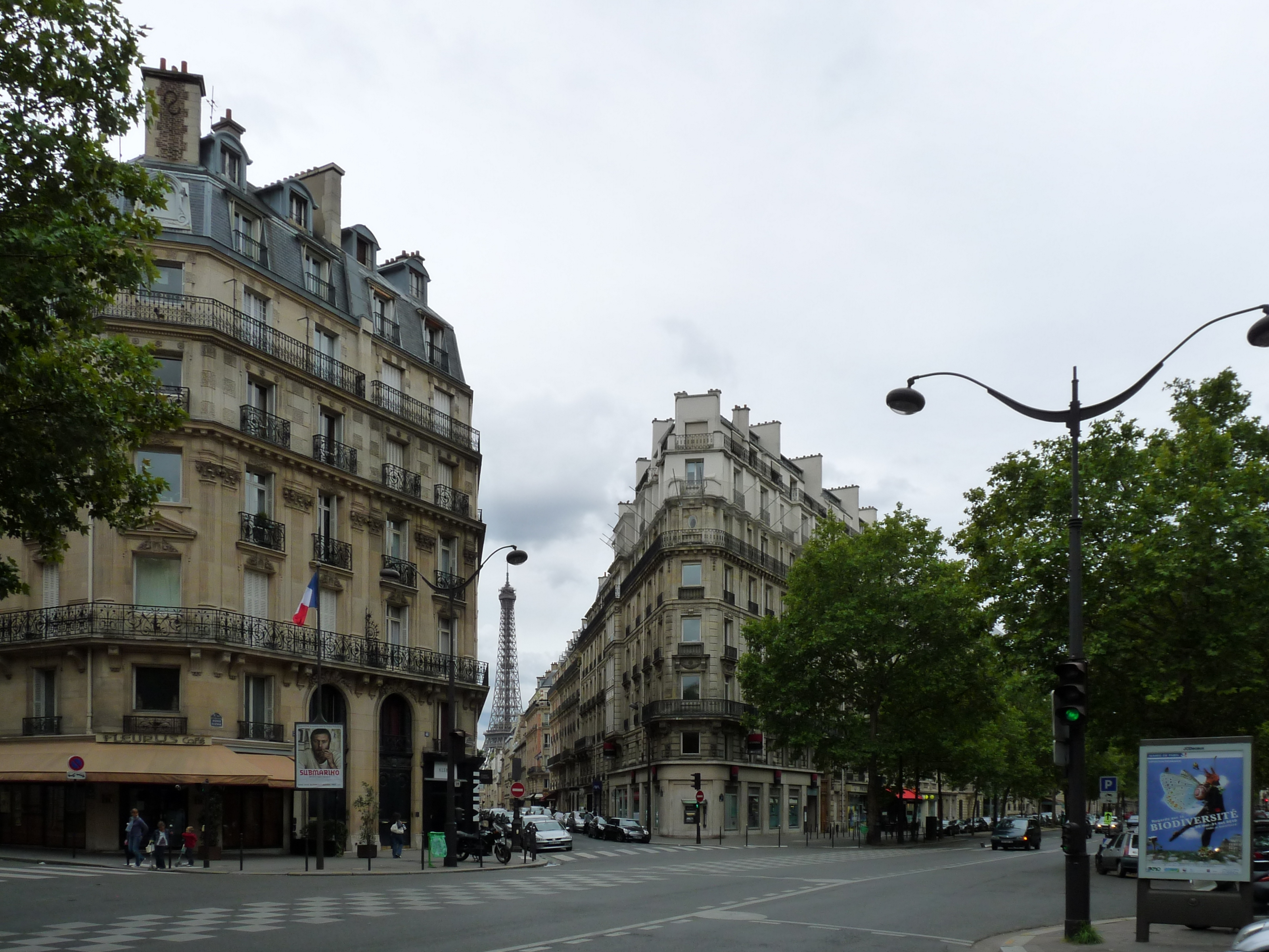 L'avenue Kléber à Paris, vue de son trottoir ouest